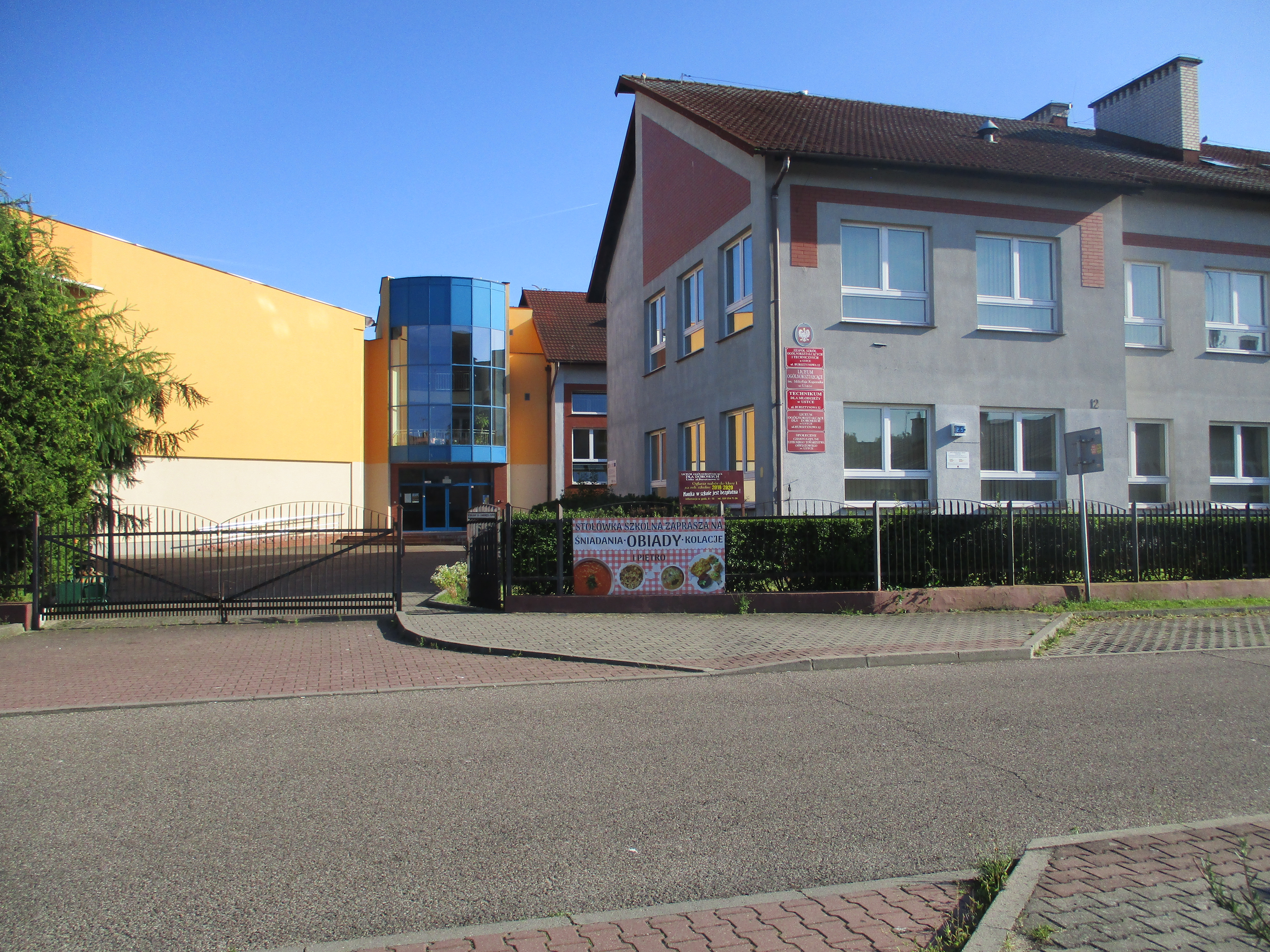 Ustka, ul. Bursztynowa- szkoły